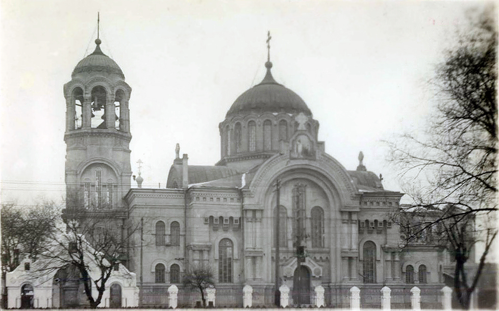 Благовещенский храм в Харбине на Пристани